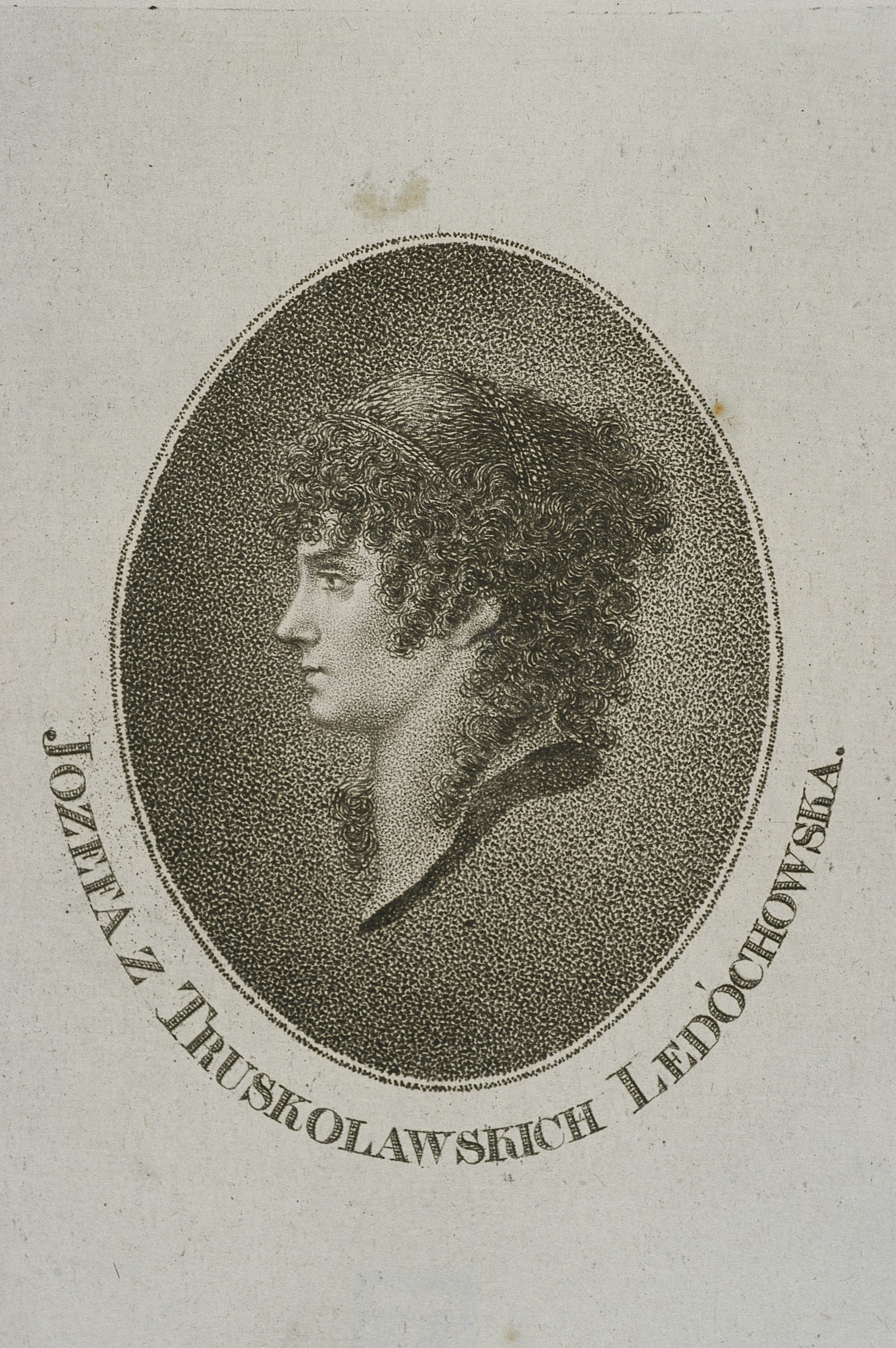 Polska aktorka działająca w latach 1792-1833 w Teatrze Narodowym w Warszawie